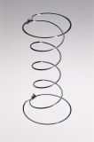 Einzelelement einer Federkernmatratze